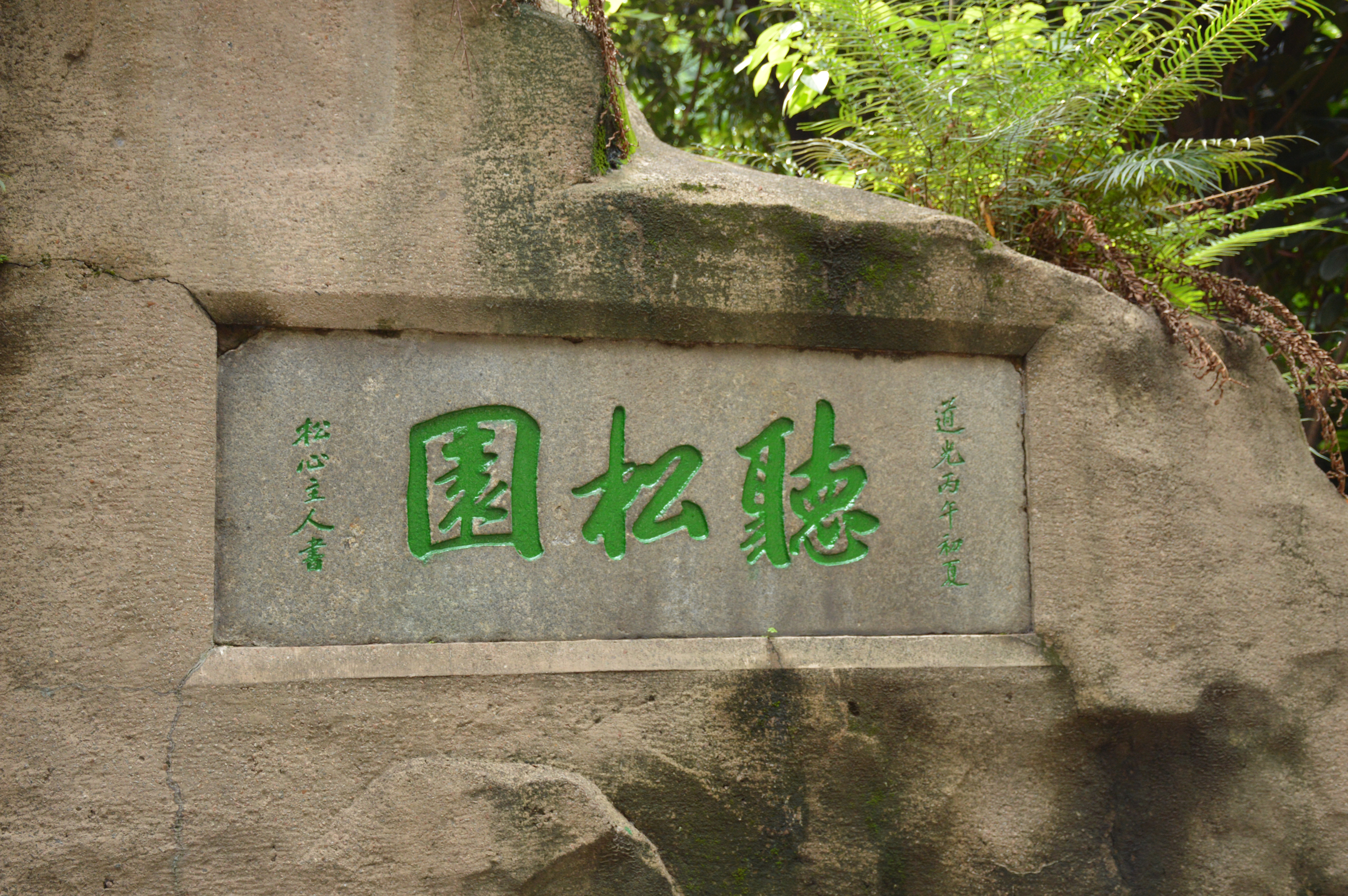 中文（中国大陆）: 位于广东省广州市荔湾区白鹤洞培英中学方社钟亭内。2002年9月1日公布为广州市登记保护文物单位。